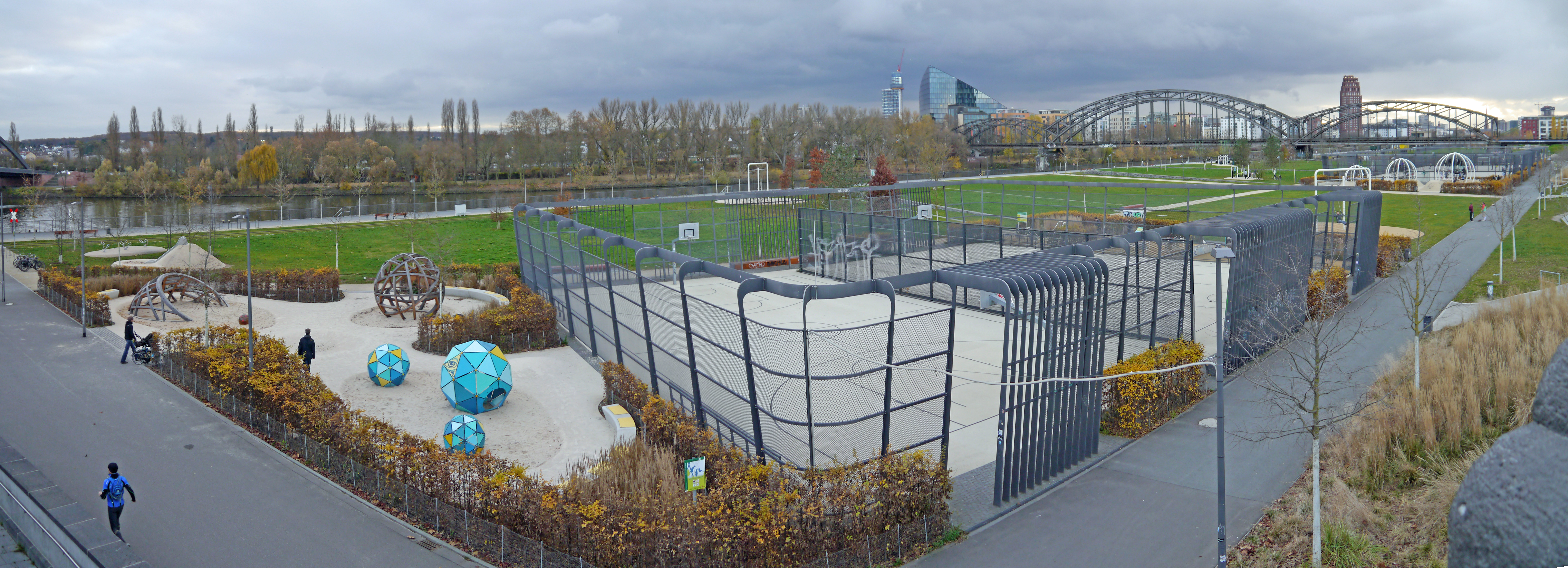 Der Spiel-, Sport- und Rasenbereich im Hafenpark im Frankfurter Ostend.